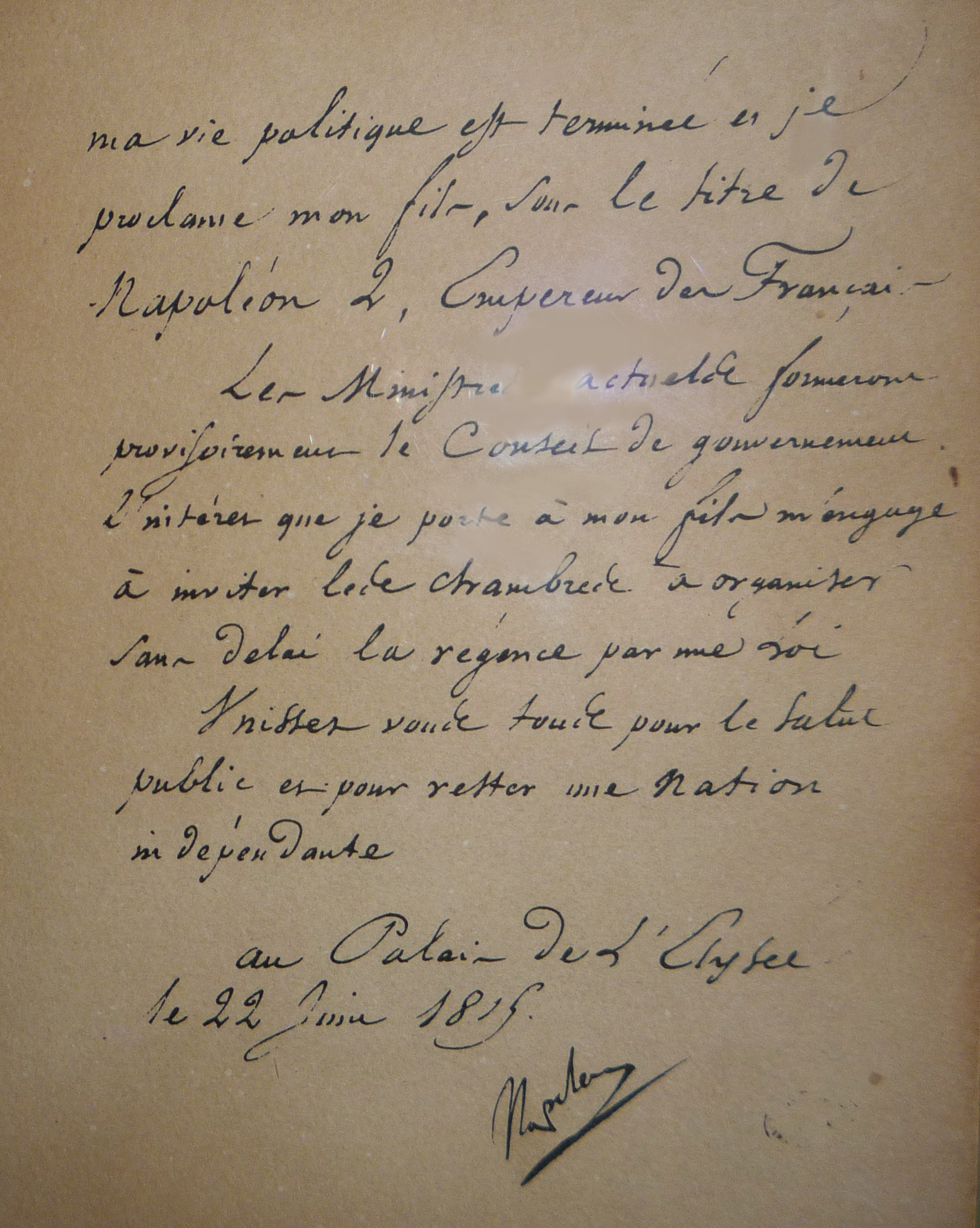 Ce document était exposé au Palais de l'Élysée lors de la journée du patrimoine, le 14 septembre 2013. Seul, la moitié du texte était exposé. Le texte en entier est celui-ci : " Déclaration au peuple français, Français, en commençant la guerre pour soutenir l'indépendance nationale, je comptais sur la réunion de tous les efforts, de toutes les volontés, et sur le concours de toutes les autorités nationales ; j'étais fondé à espérer le succès, et j'avais bravé toutes les déclarations des puissances contre moi. Les circonstances paraissent changées. Je m'offre en sacrifice à la haine des ennemis de la France. Puissent-ils être sincères dans leurs déclarations de n'en avoir jamais voulu qu'à ma personne ! Ma vie politique est terminée, et je proclame mon fils, sous le nom de Napoléon II, Empereur des Français. Les ministres actuels formeront provisoirement le conseil de gouvernement. L'intérêt que je porte à mon fils m'engage à inviter les Chambres à organiser, sans délai, la régence par une loi. Unissez-vous tous pour le salut public, et pour rester une nation indépendante, Au Palais de l'Elysée, le 22 juin 1815".